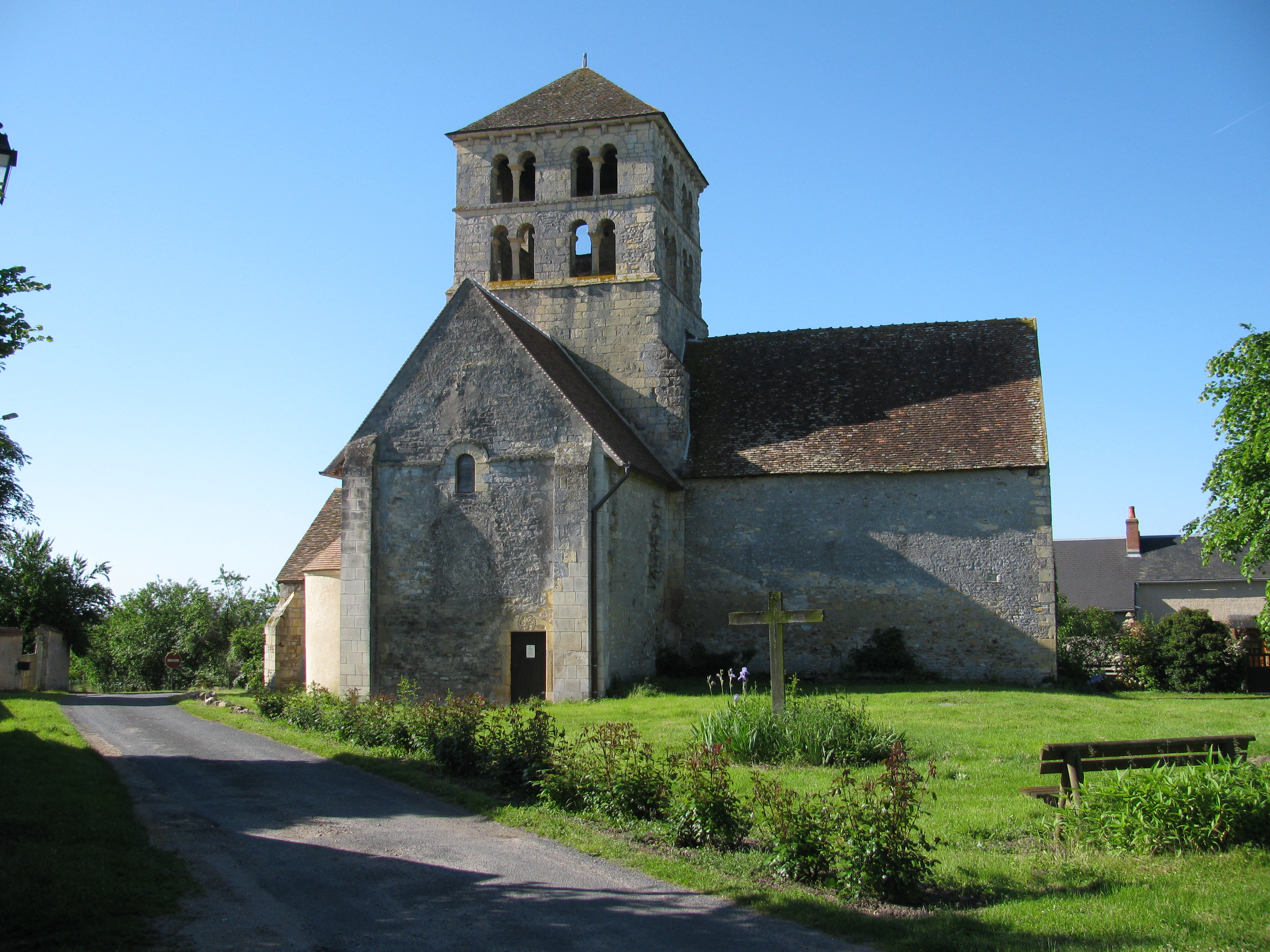 Église Saint-Laurent de Béard